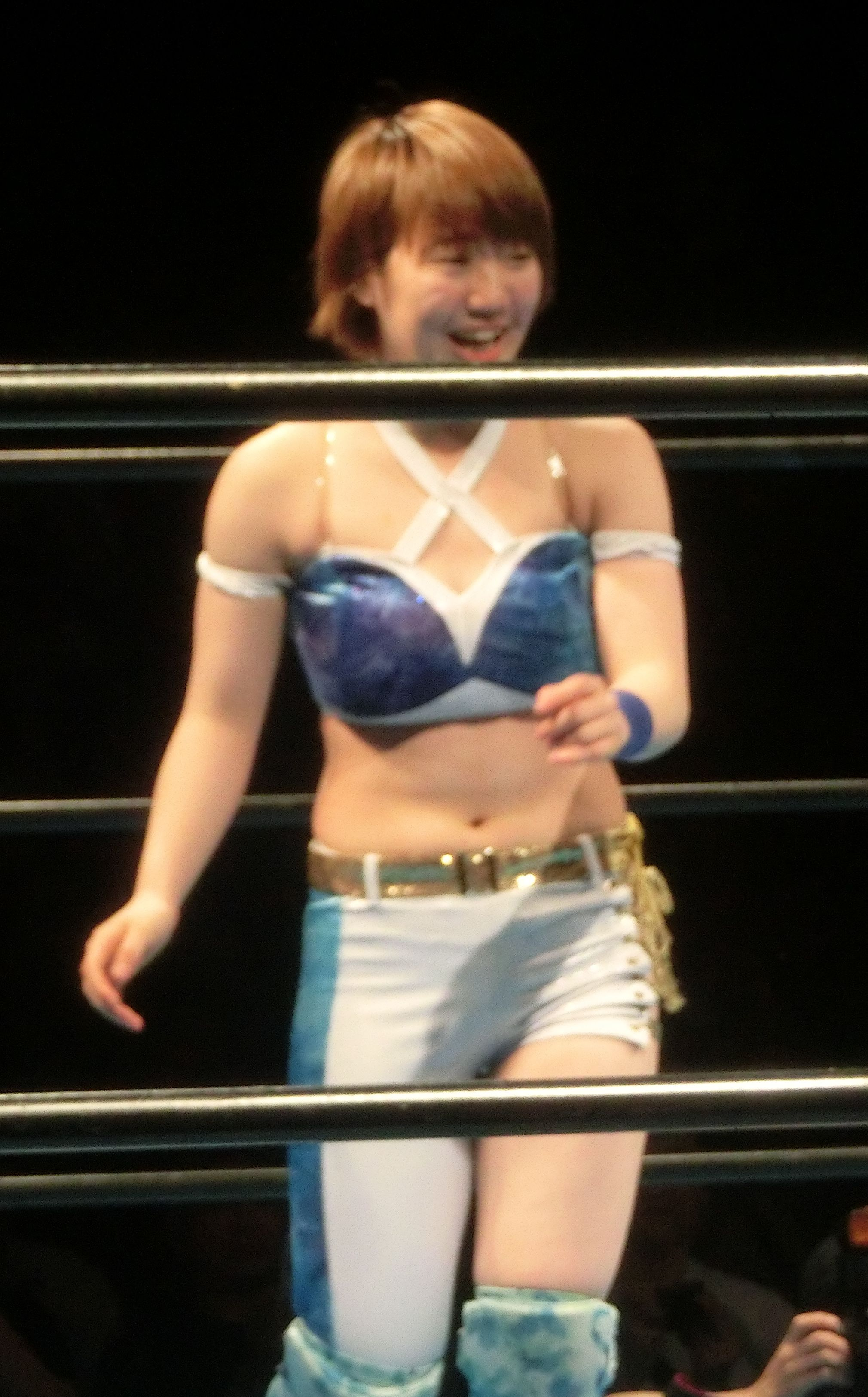 カラーズ新木場2019年5月